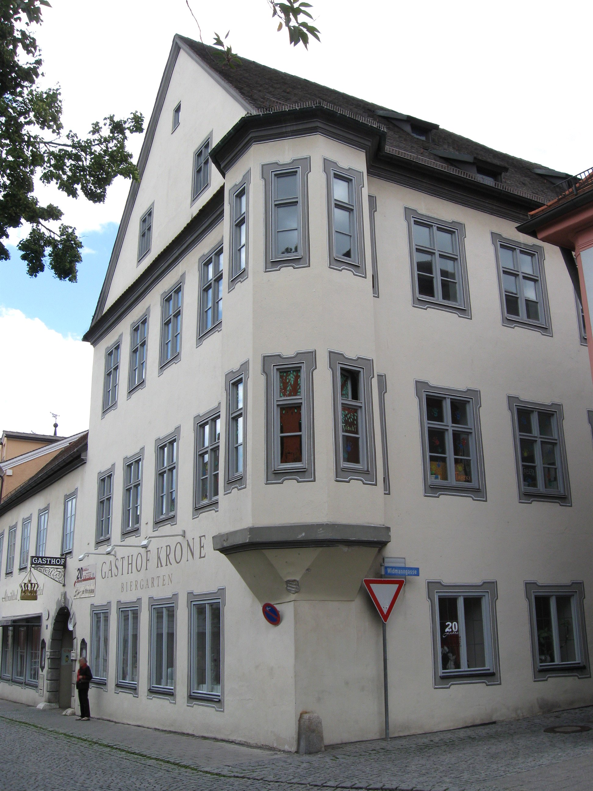 Domplatz 3; ehemaliger Domherrenhof Speth, jetzt Gasthaus "Krone"; geschlossene Vierflügelanlage, zum Domplatz dreigeschossiger Giebelbau mit Eckerker und traufseitigem Flügel, bezeichnet mit dem Jahr 1675, wohl von Giovanni Giacomo Engl; im Hof mittelalterlicher Wohnturm, 13. Jahrhundert, mit barock stuckiertem Turmsaal von 1690. D-1-76-123-49